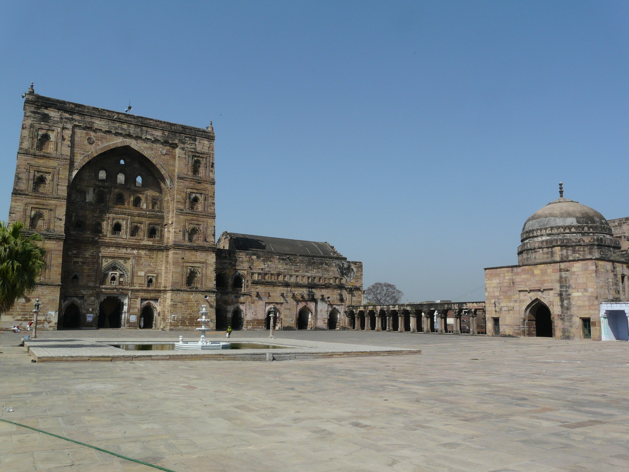 Mosque courtyard